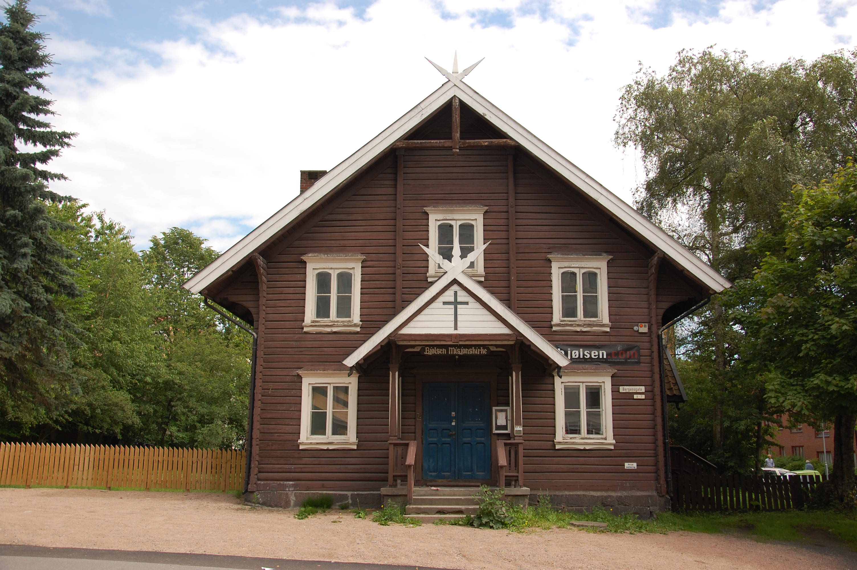 Bjølsen misjonskirke, bedehus i laftet tømmer fra 1893. Bergensgata 7-9 på Sagene/Bjølsen.